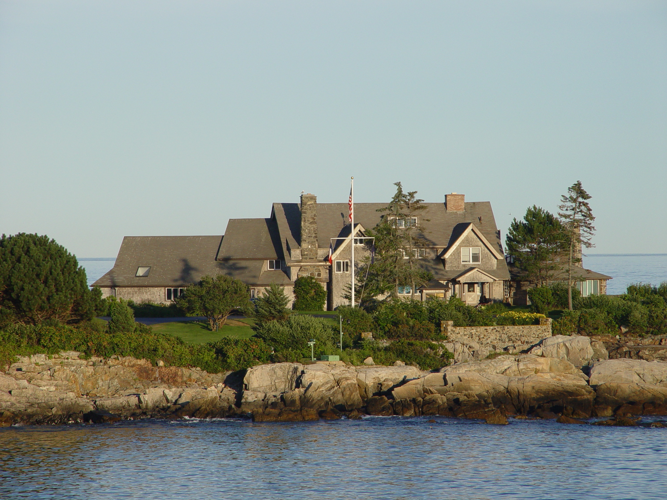 Bush compound in Kennebunkport, Maine. Das Bush-Anwesen in Kennebunkport, Maine